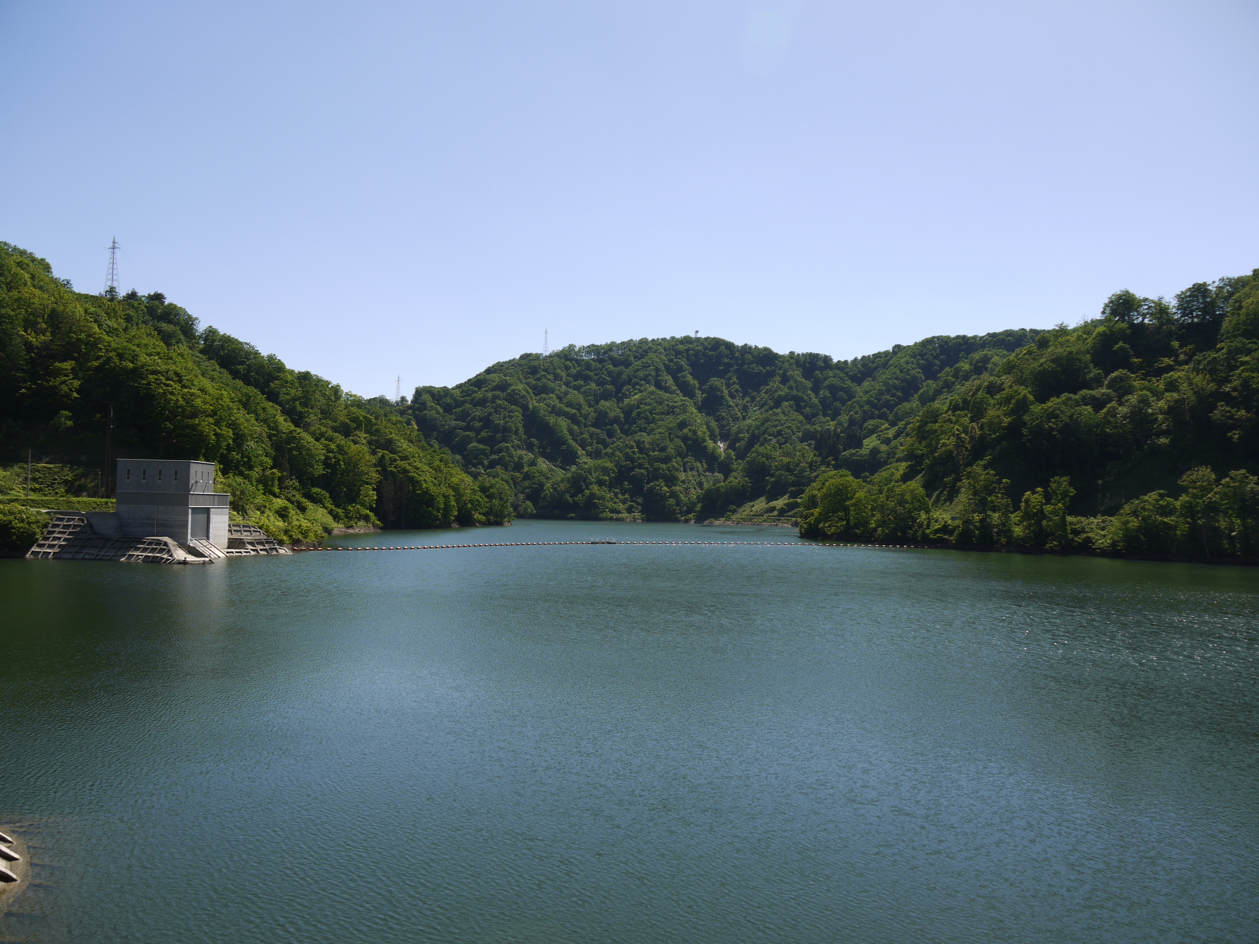 横川ダムのダム湖